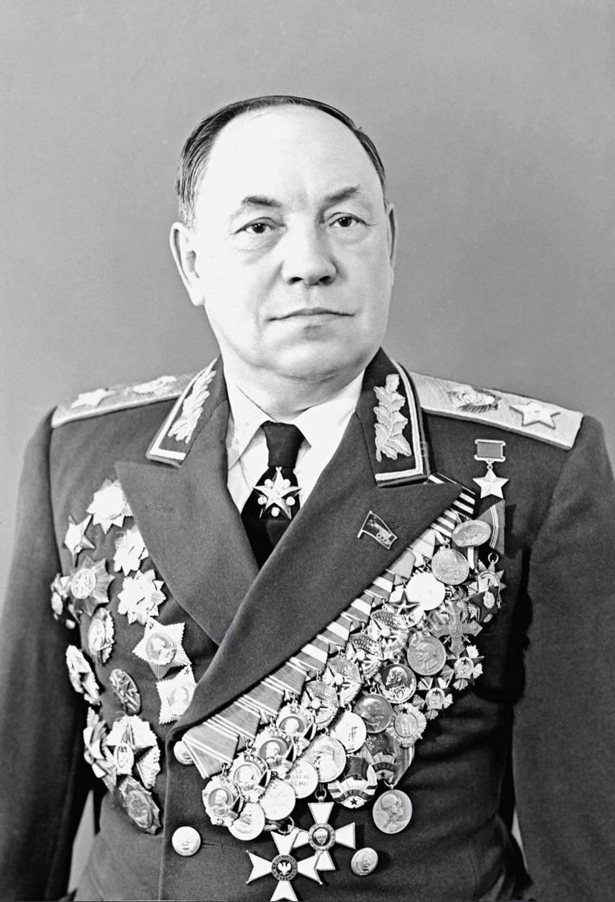 Маршал Советского Союза Захаров Матвей Васильевич(1898 — 1972)